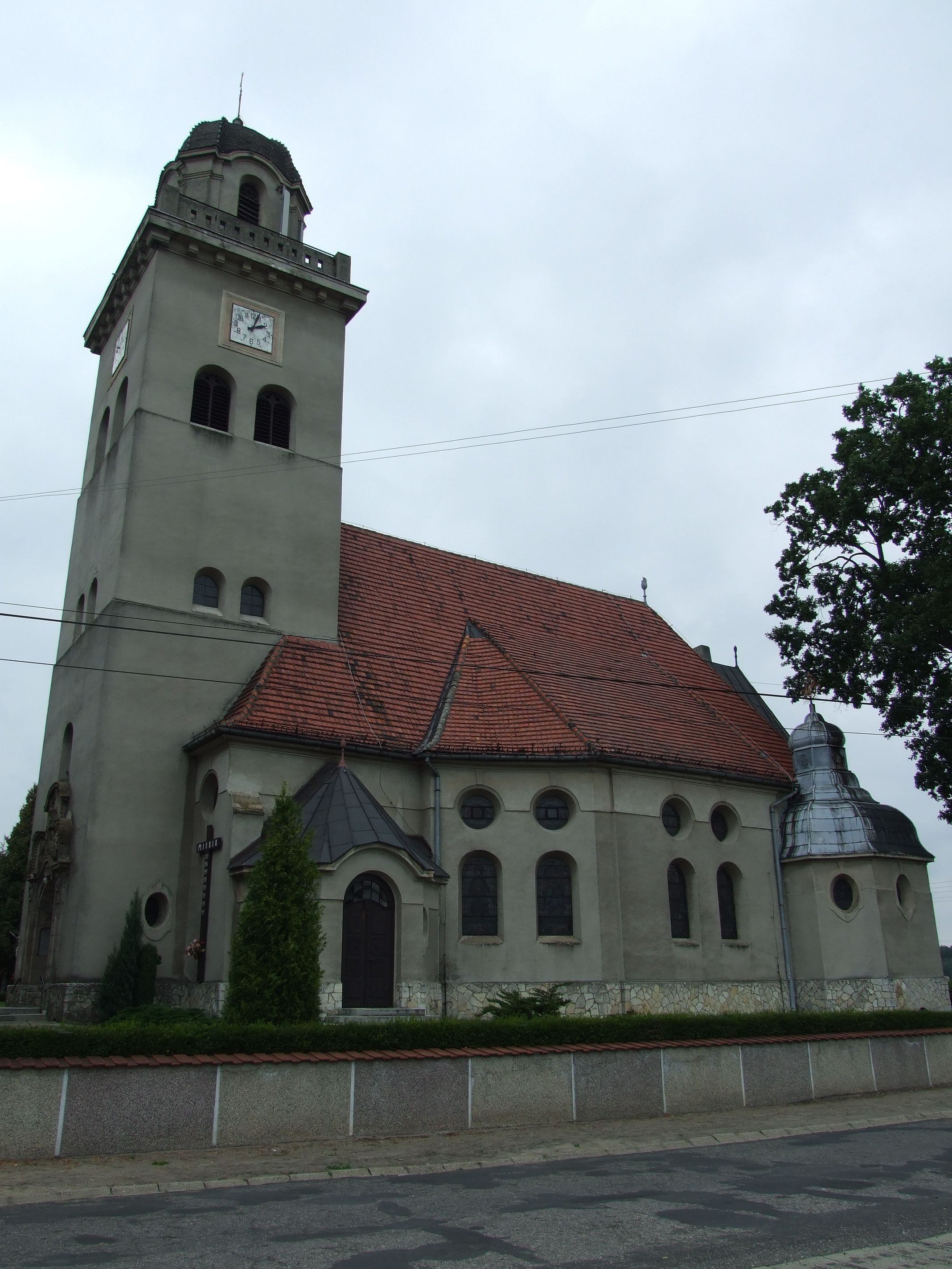 Kirche in Łomnica (Oppelner Woiwodschaft)